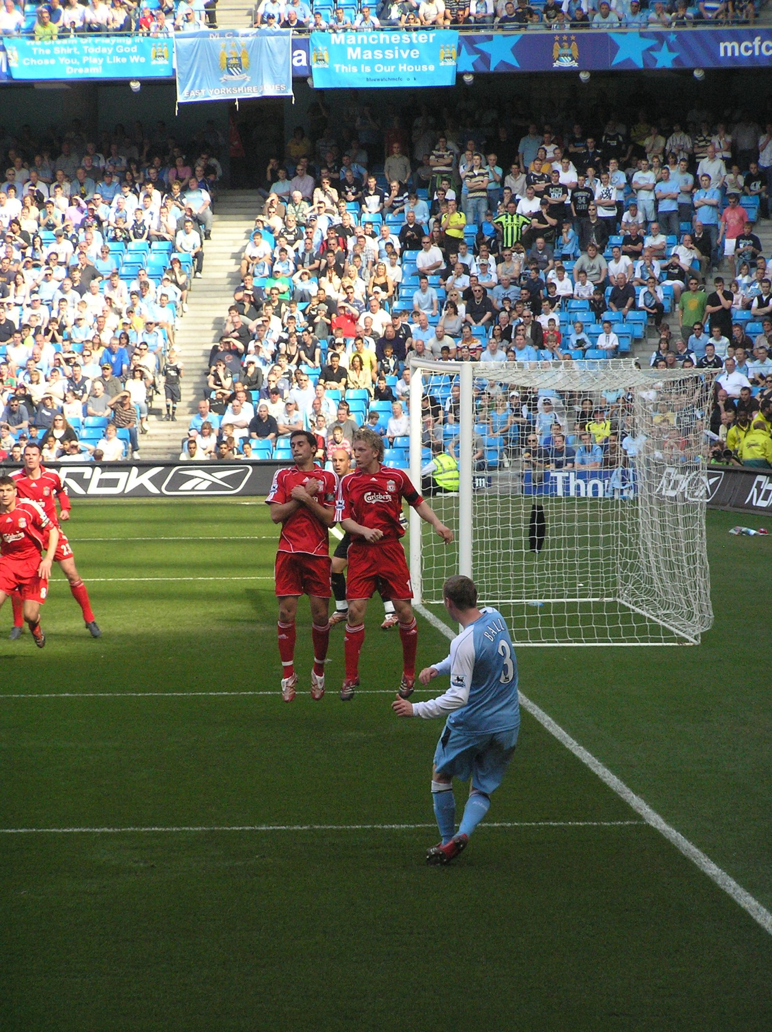 Free Kick